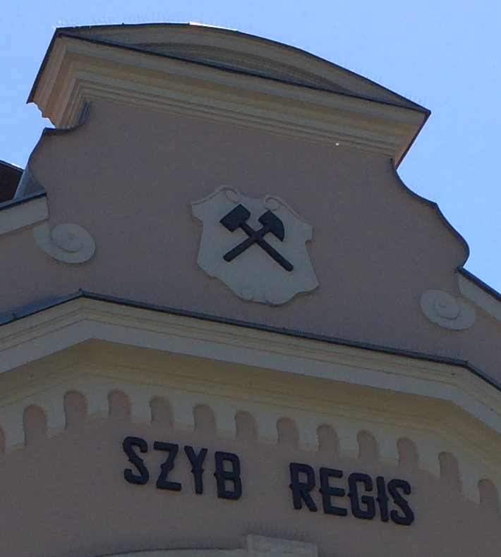 Wieliczka 2015 - вигляд герба на будинку